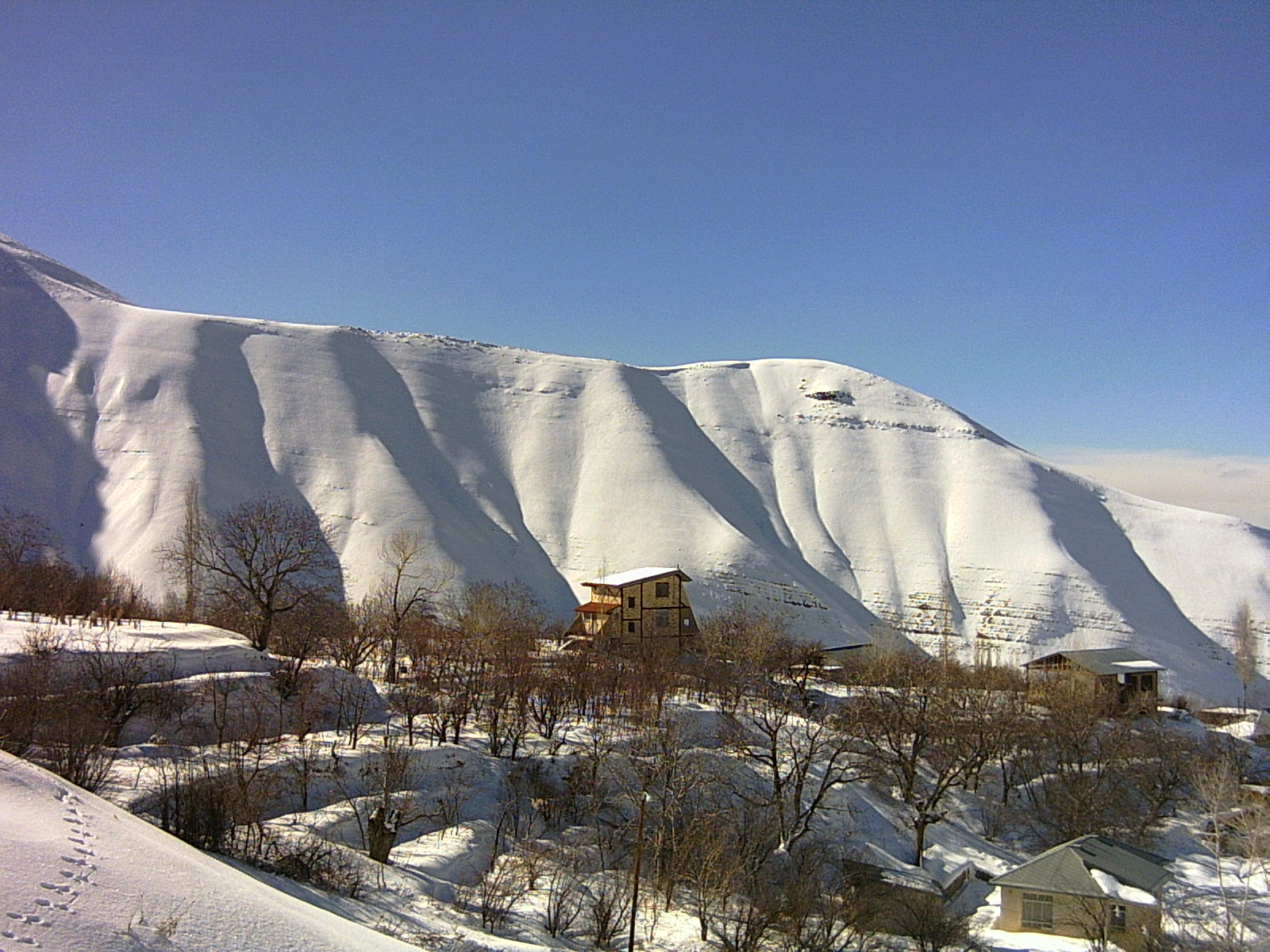 khur zankala near ski pist 12